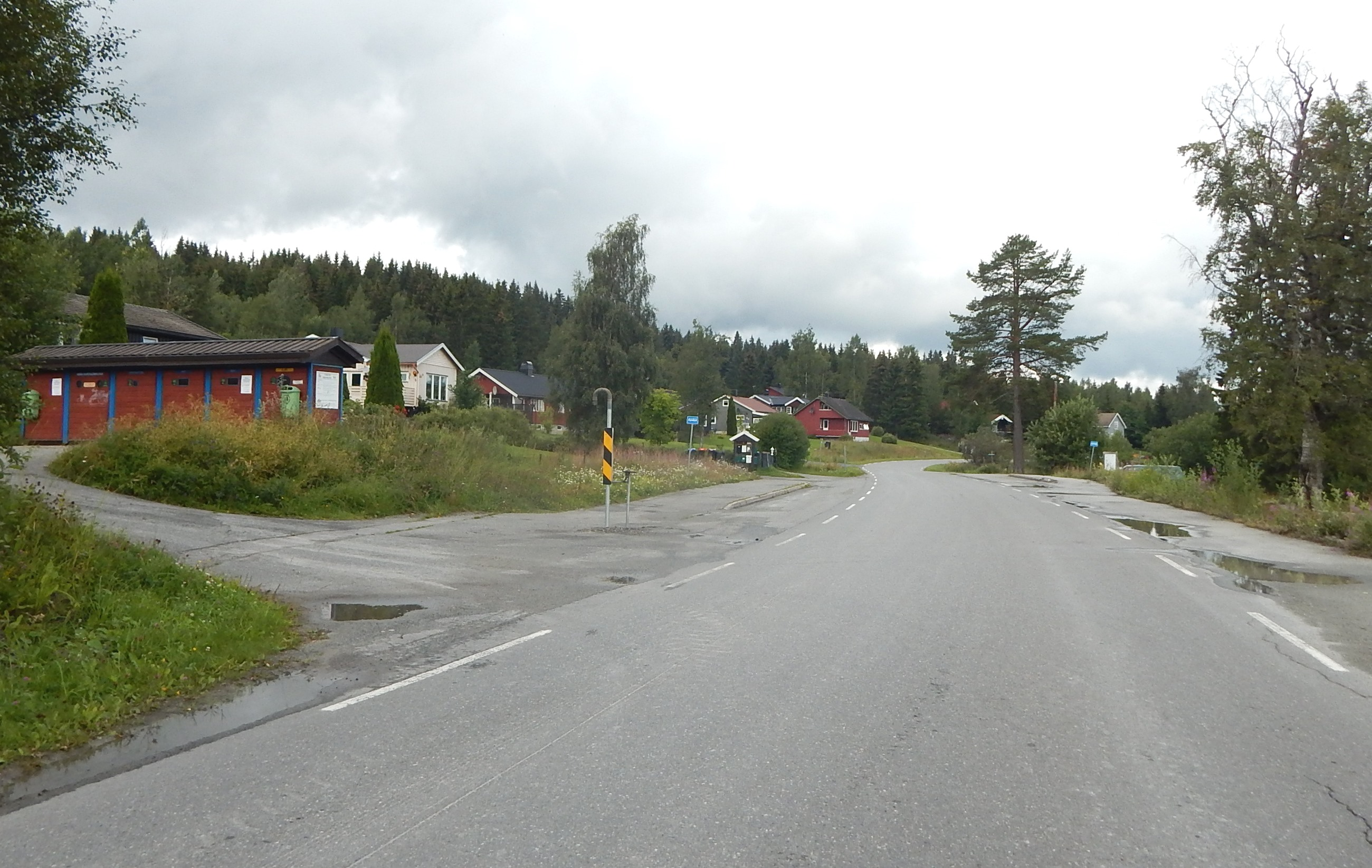 Brumundvegen (fylkesvei 1710, tidl. 47)